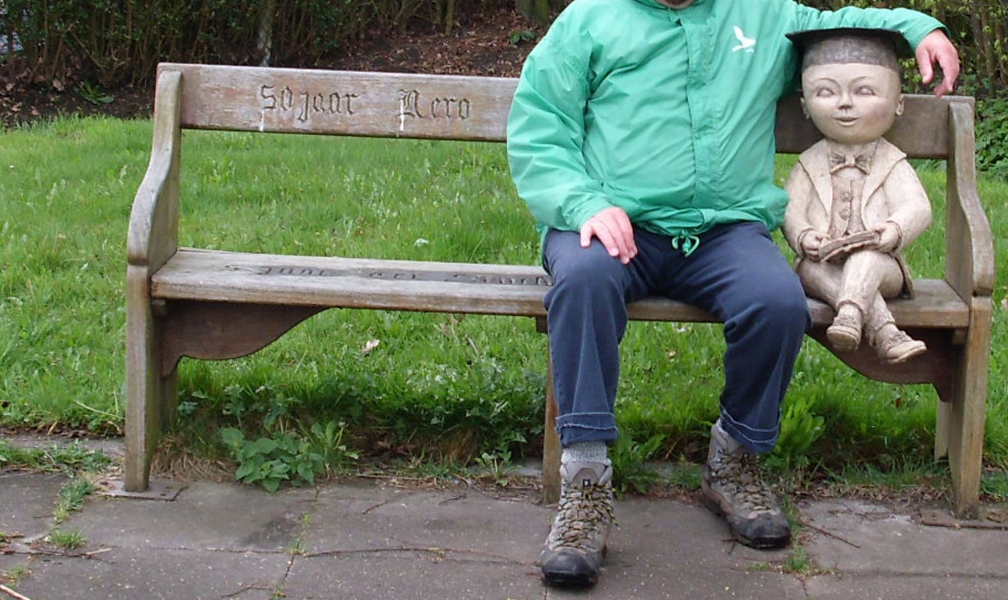 Zitbank in de Zinkstraat - Munte - Merelbeke - Oost-Vlaanderen - Vlaanderen - België